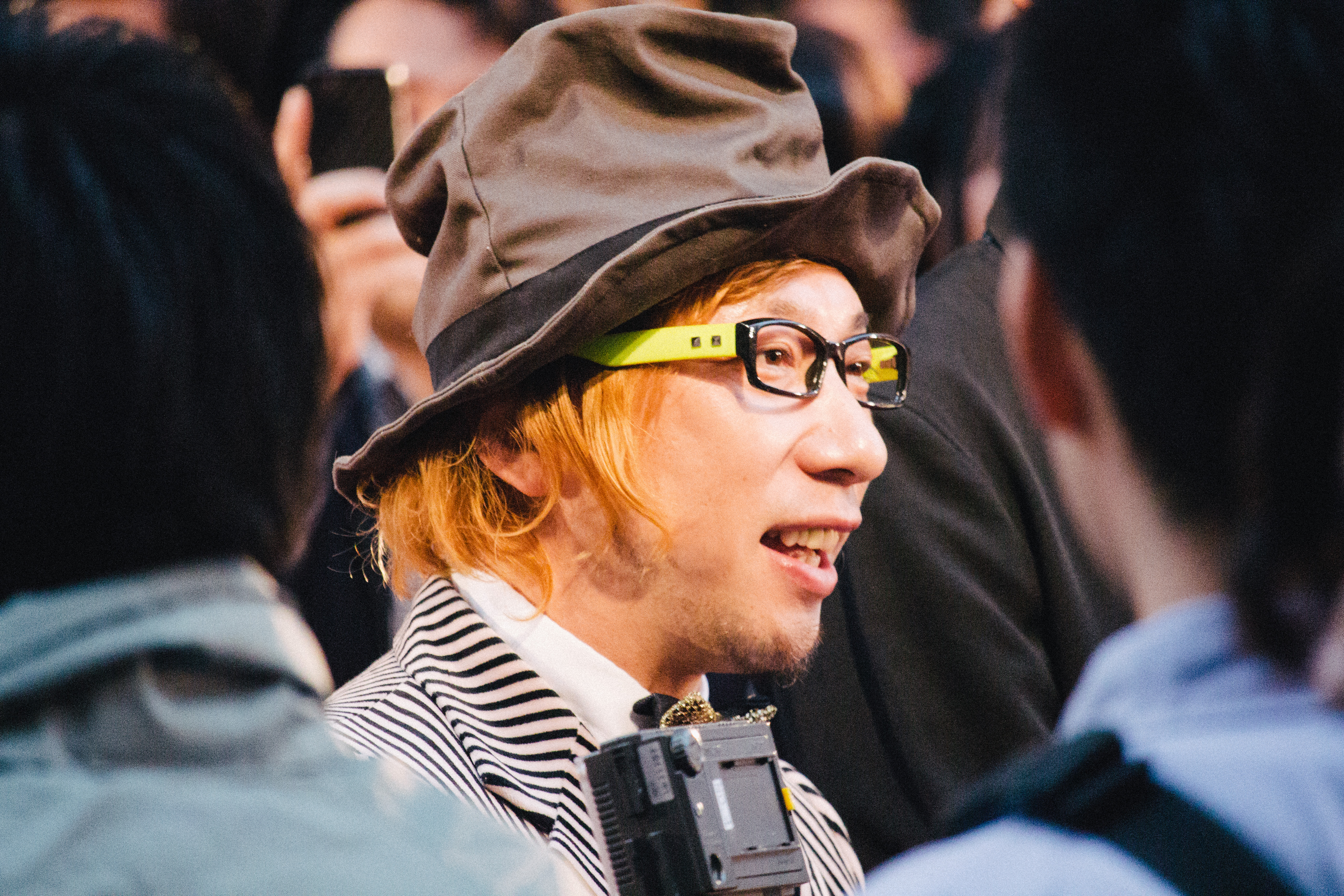 第27回 東京国際映画祭 増田セバスチャン (くるみ割り人形)